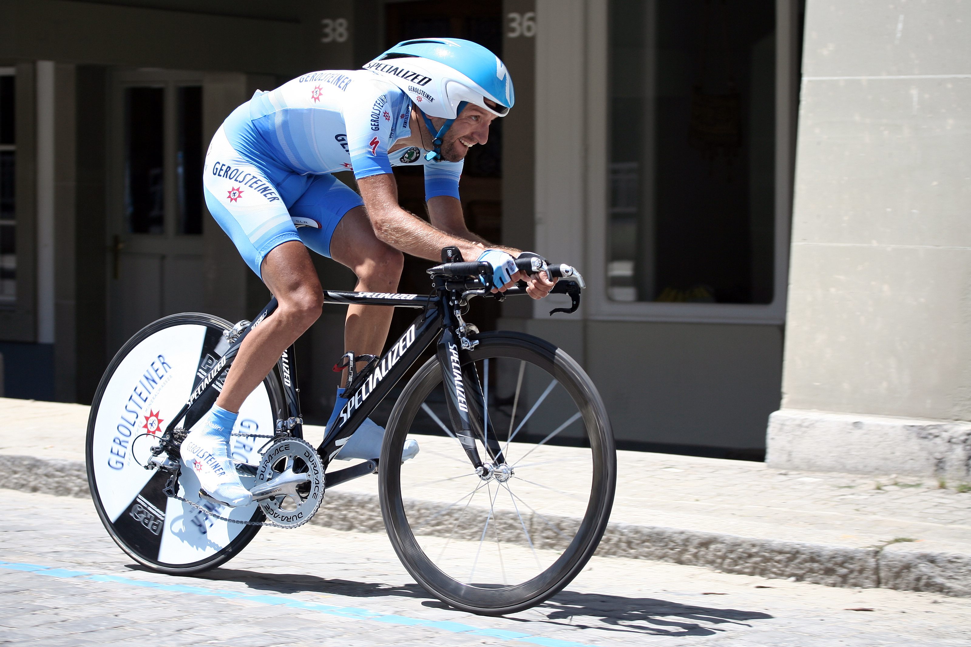 Volker Ordowski, Bern, Switzerland (Einzelzeitfahren Tour de Suisse 2007)